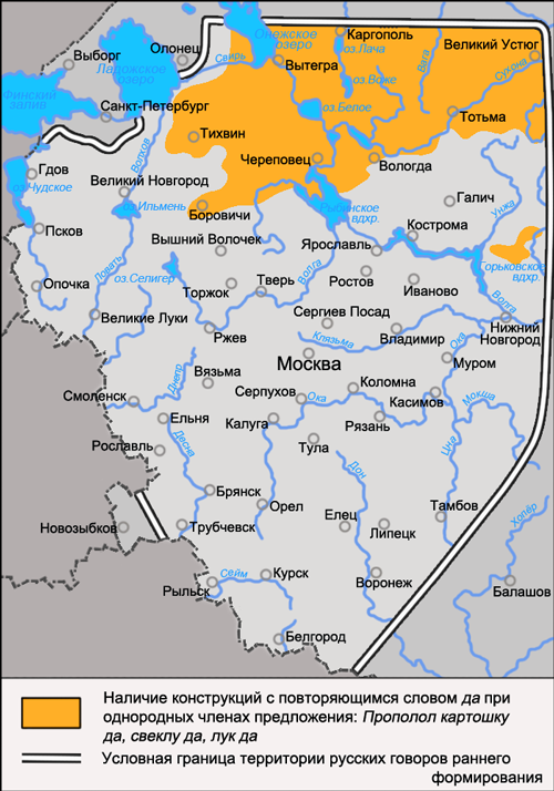 Карта распространения диалектного явления русского языка в области синтаксиса: употребление конструкций с повторяющимся словом да при однородных членах предложения: Прополол картошку да, свеклу да, лук да. Источник: Захарова К. Ф., Орлова В. Г. Диалектное членение русского языка — 2-е изд. — М.: Едиториал УРСС, 2004. — ISBN 5-354-00917-0, с. 86.